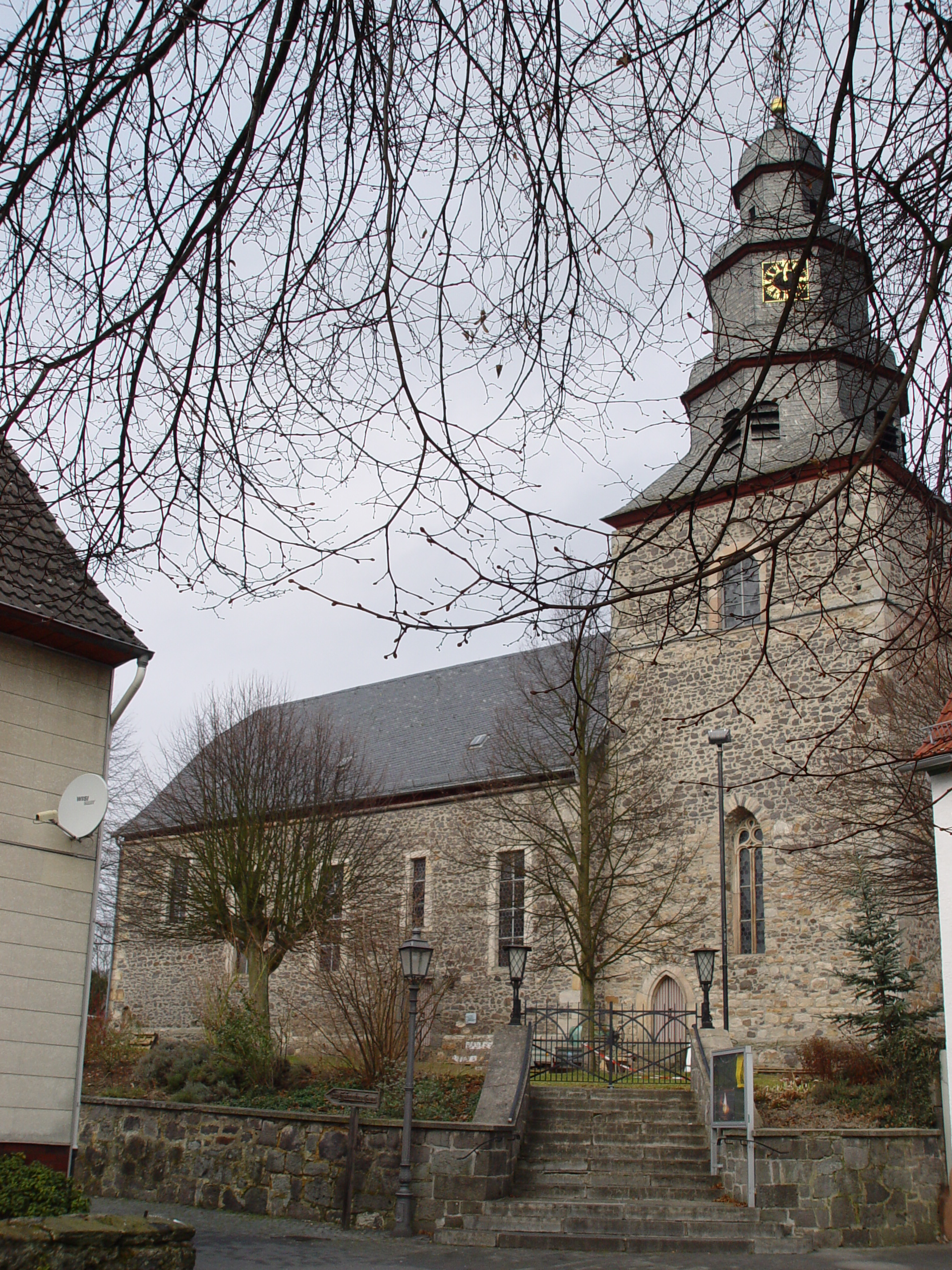 Evangelische Kirche in Allendorf/Lumda, Hessen